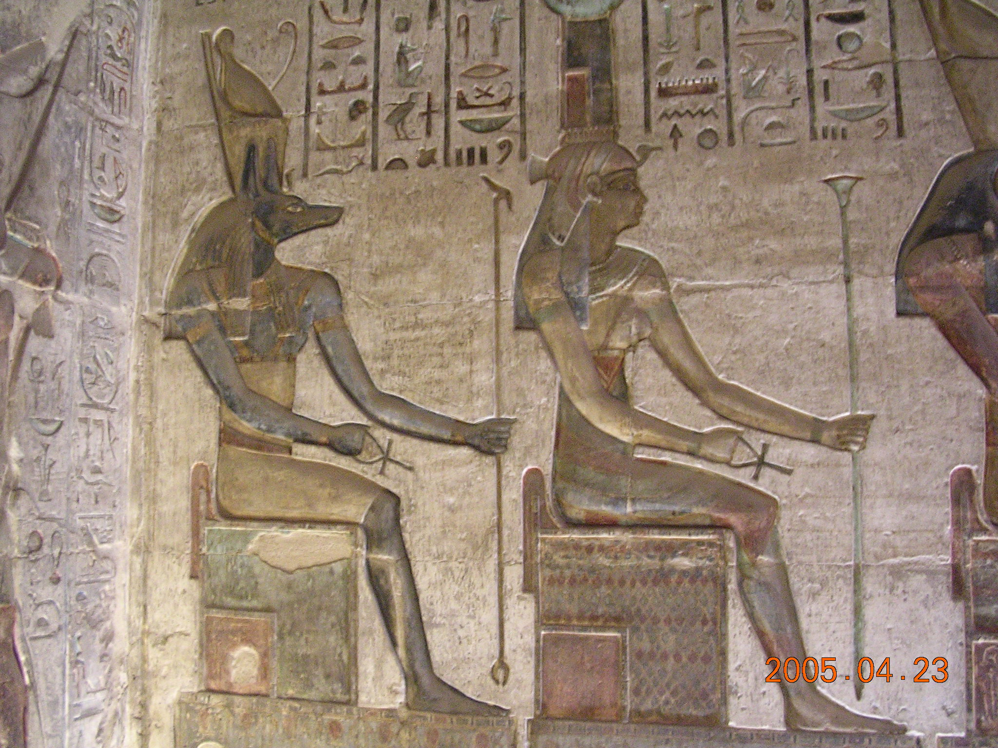 Anubisz és Nephtüsz (Egyiptom, Théba, Deir-el-Medine)